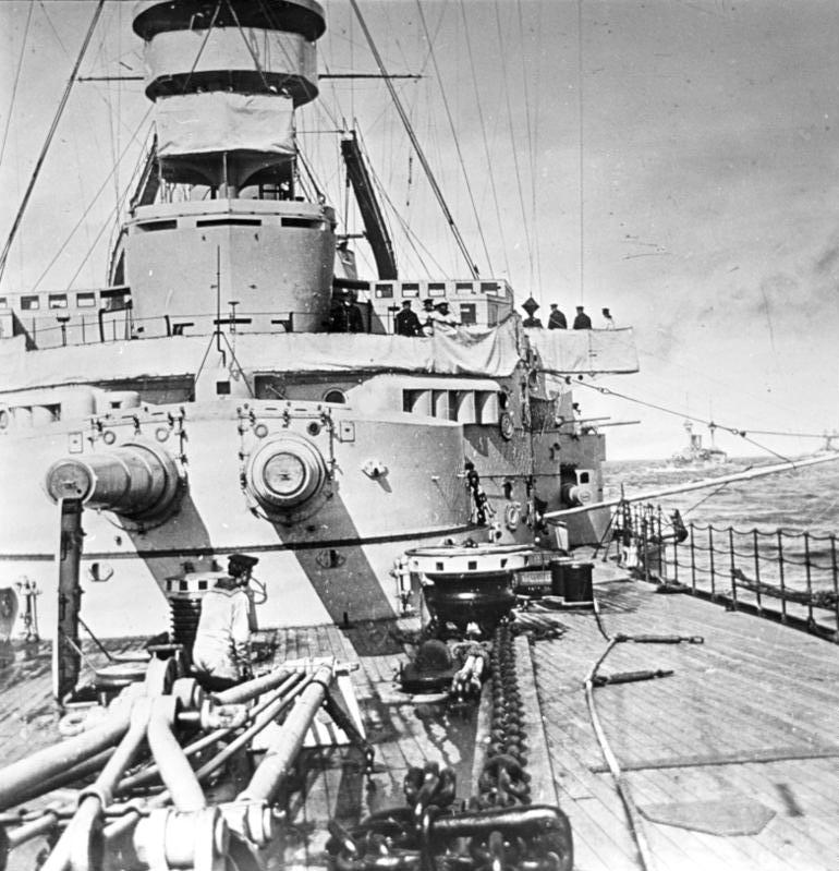 "SMS Deutschland", vorderer Geschützturm Vorderer Geschützturm, 28cm Kaliber, des Linienschiffes "S.M.S. Deutschland" der Deutschland-Klasse